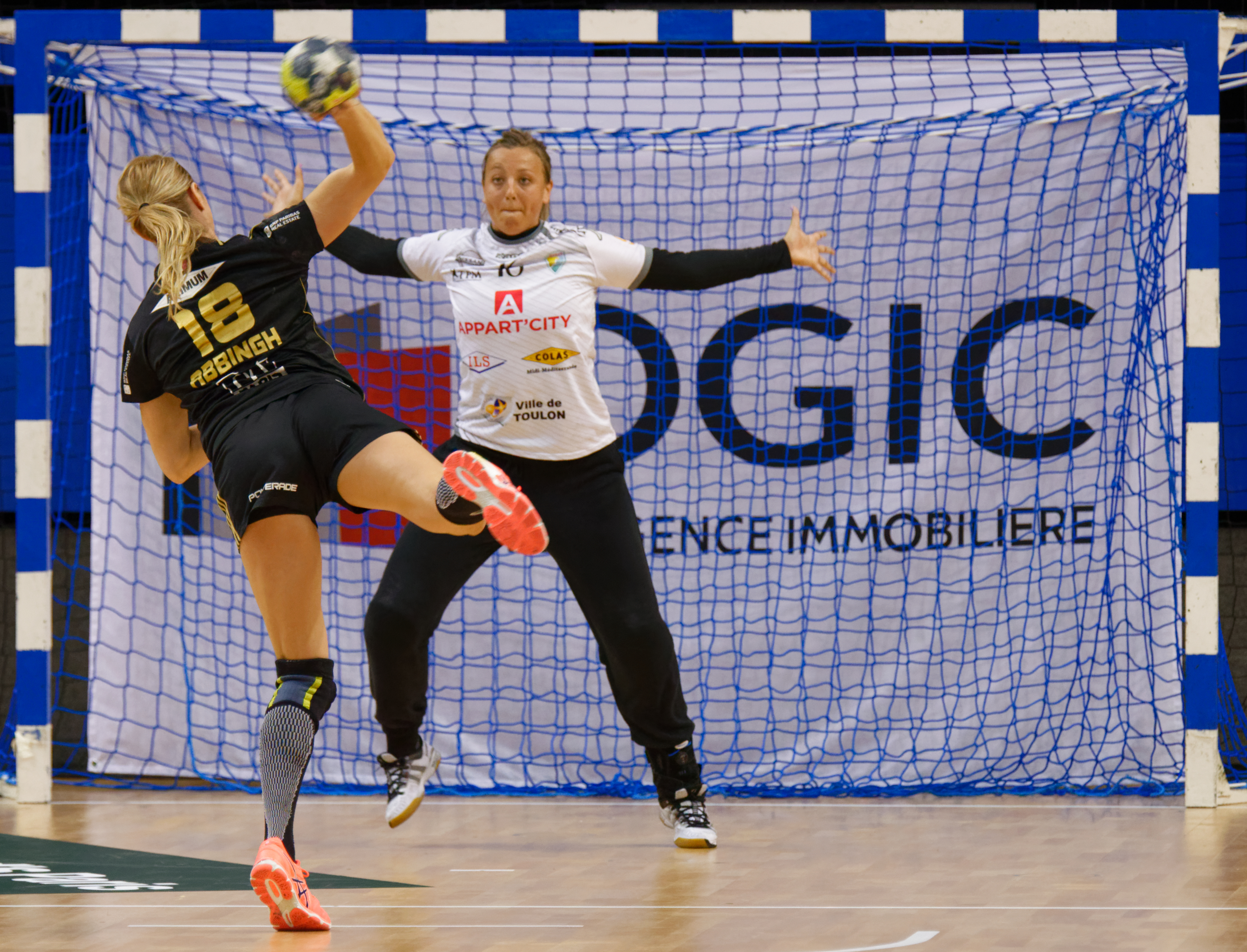 Rencontre de quart de finale retour des playoffs entre Issy Paris Hand et Toulon St Cyr. A Coubertin, le 7 mai 2017.